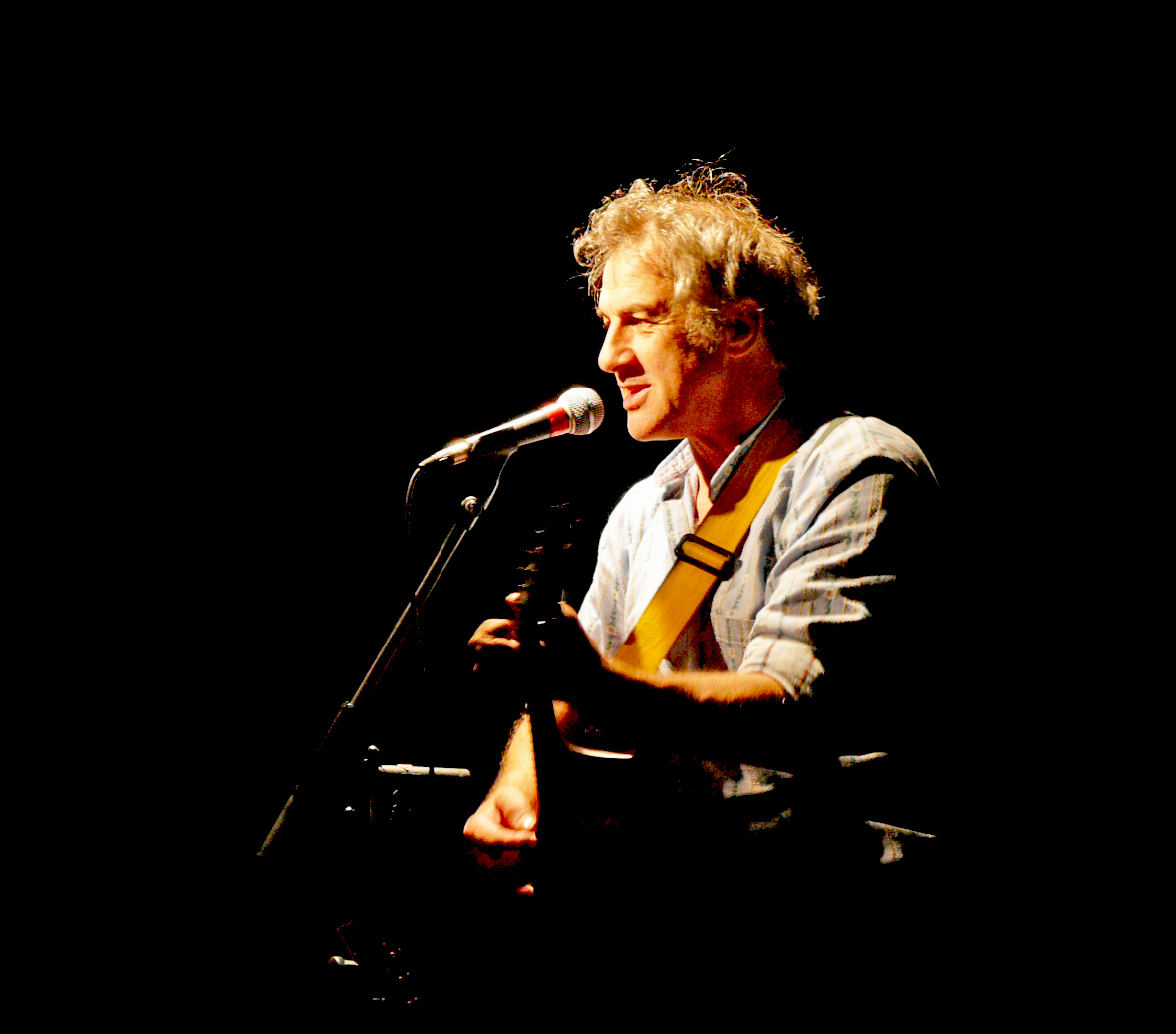 Sarclo en concert à la MJC Pichon de Nancy le 9 juin 2011.